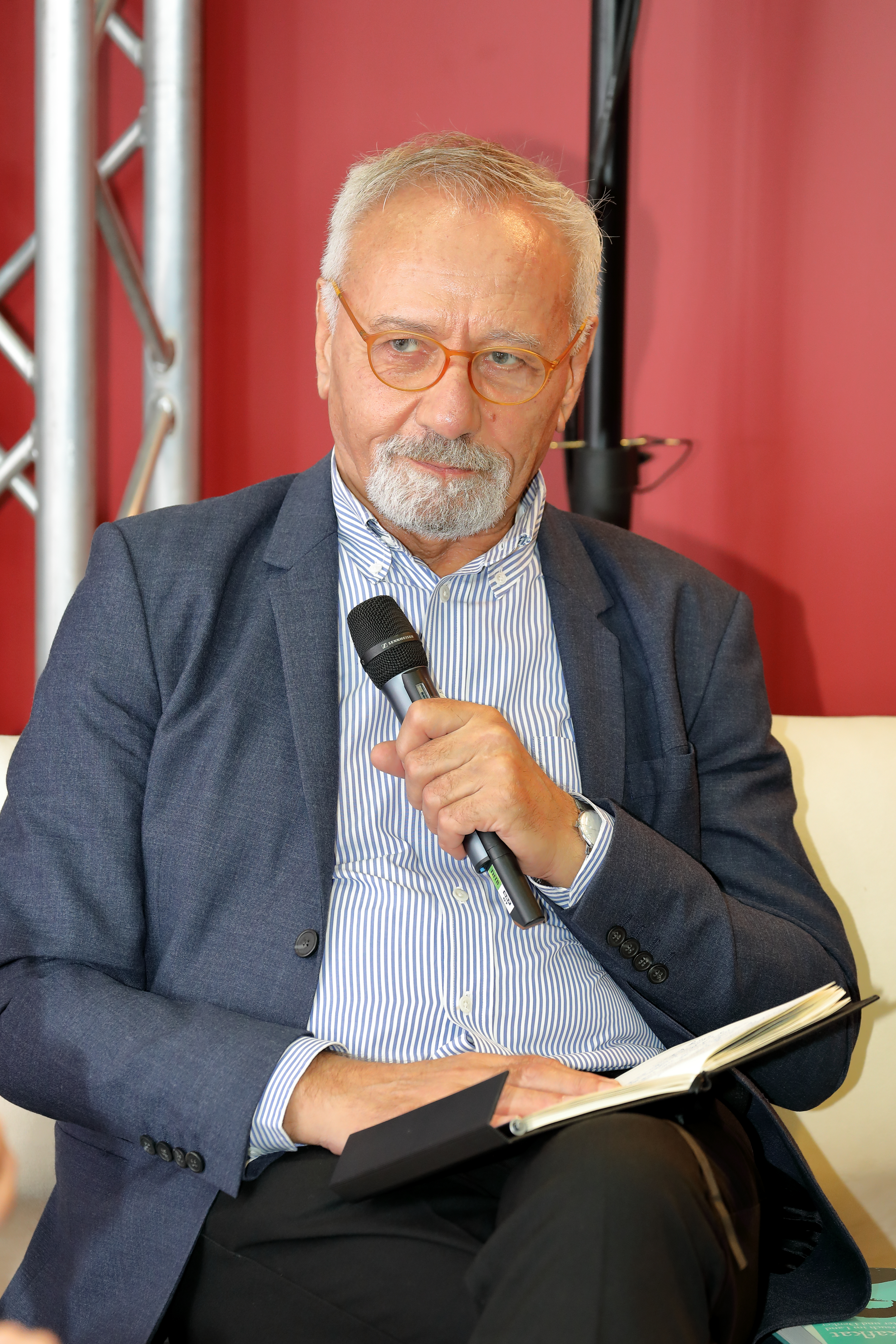 Der österreichische Autor, Filmemacher und Journalist Ernst A. Grandits als Moderator in der 3sat-Lounge der Wiener Buchmesse 2018.